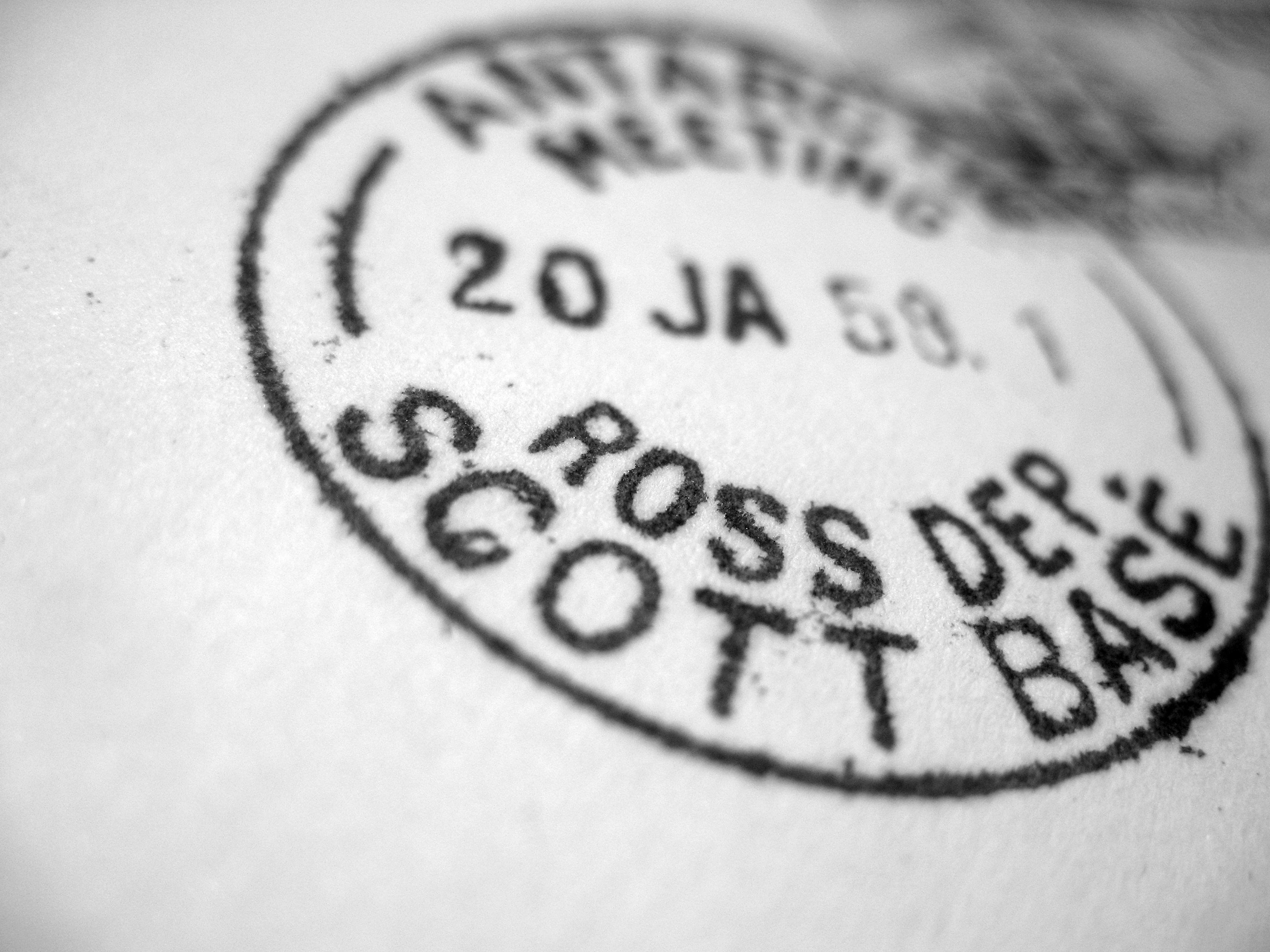 + 00000000001_Image_Poststempel_Postamt_Scott Base_Ross Dep_Antarktis